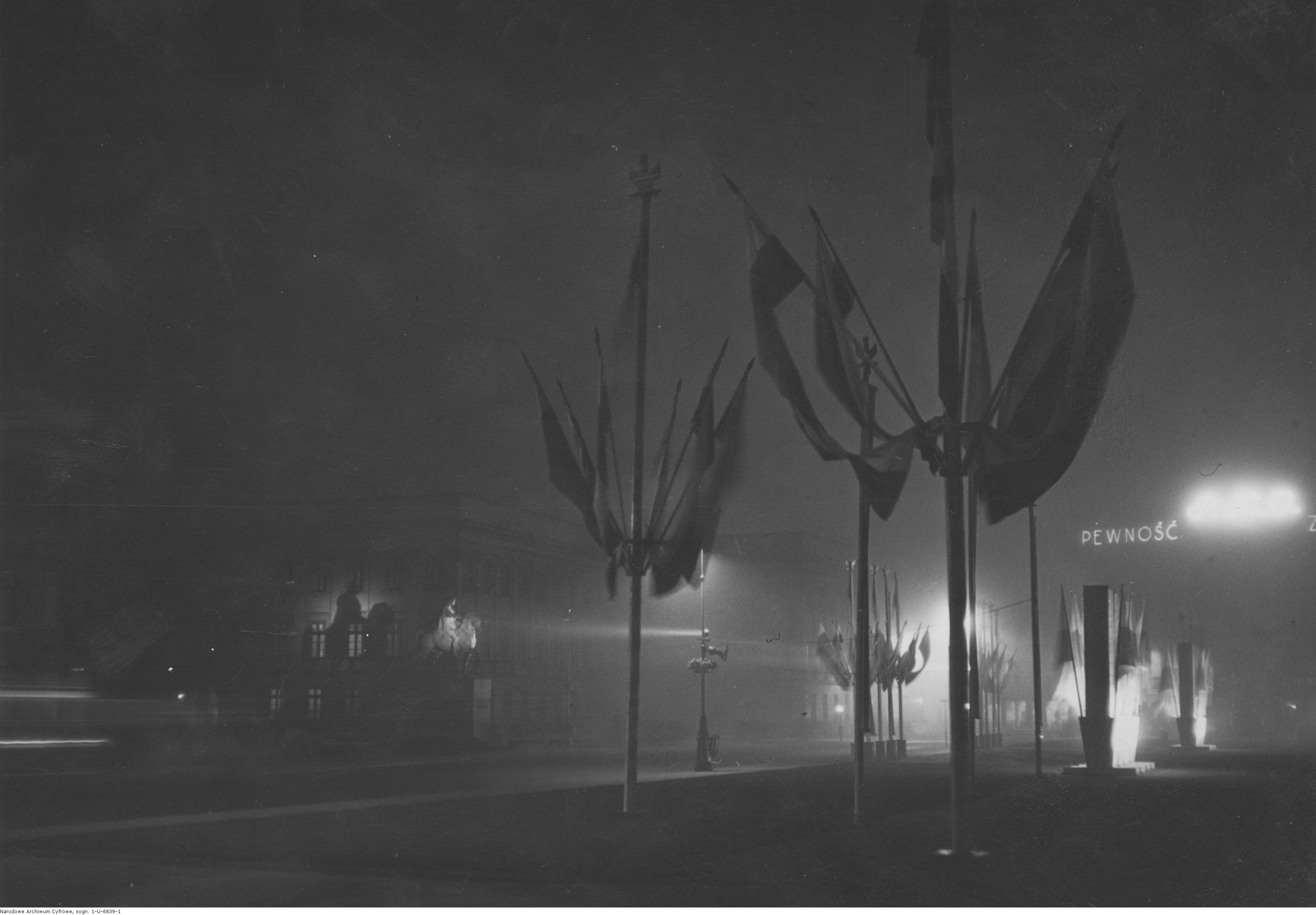 Warszawa. Plac Piłsudskiego udekorowany flagami w rocznicę odzyskania niepodległości. Widoczny oświetlony pomnik ks. Józefa Poniatowskiego.